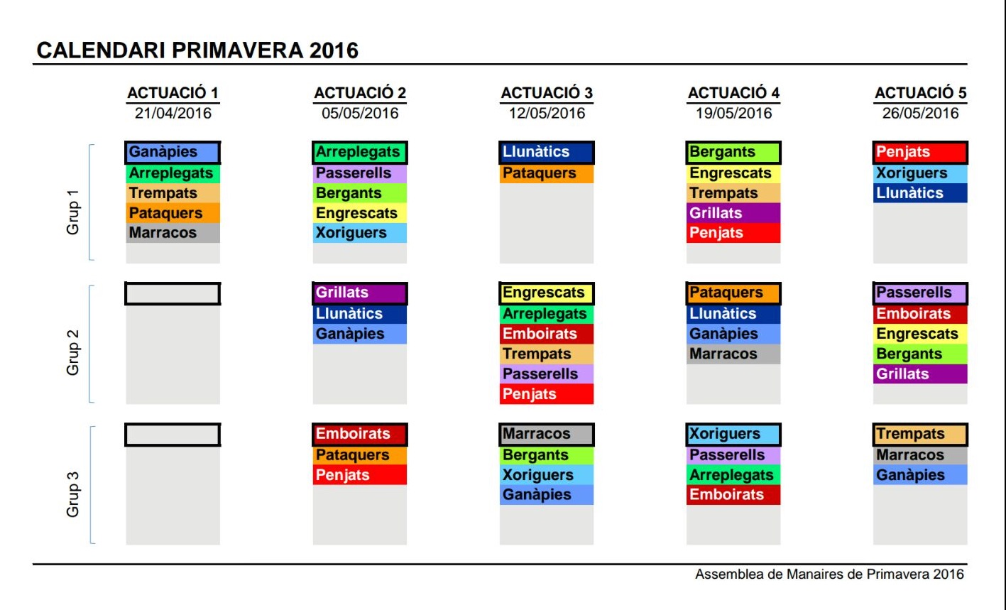 Calendari de les diades castelleres universitàries de primavera del 2016. Les caselles emmarcades en negre indiquen les colles organitzadores i amfitriones de cada una de les diades. Document provinent de l'Assemblea de Manaires, assemblea coordinadora de les colles castelleres universitàries.